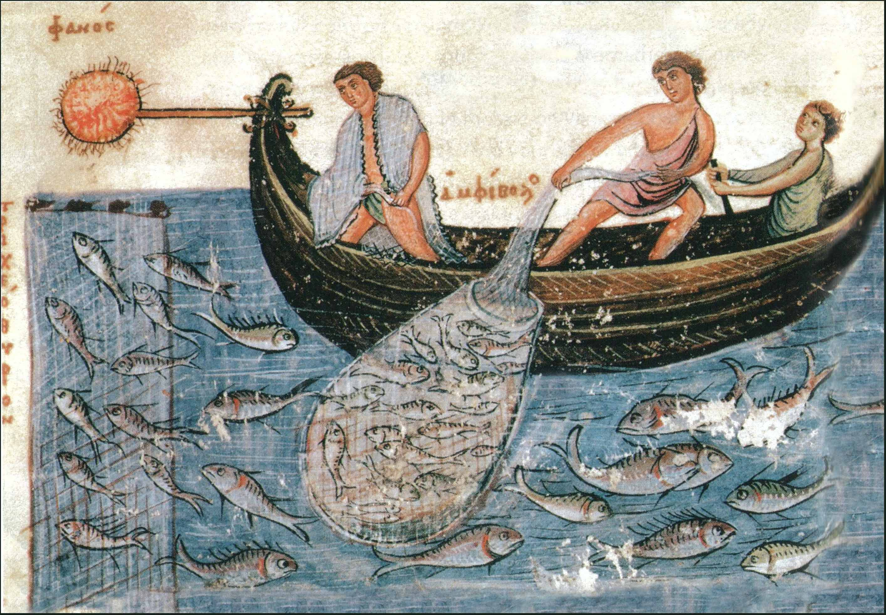 Pêcheurs au lamparo de l'Empire byzantin, du Codex Skylitzès Matritensis, Bibliothèque nationale de Madrid, Vitr. 26-2.